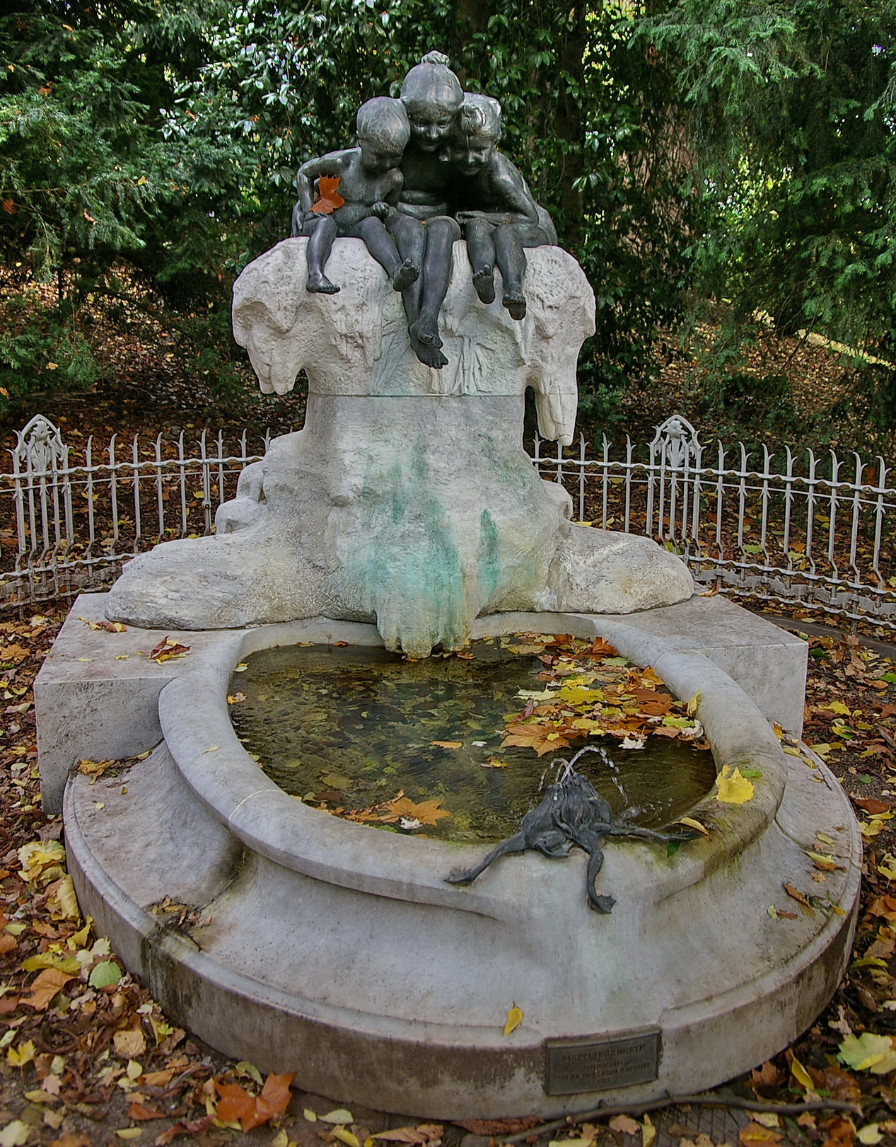 Märchenbrunnen im Hofgarten in Düsseldorf im Herbst